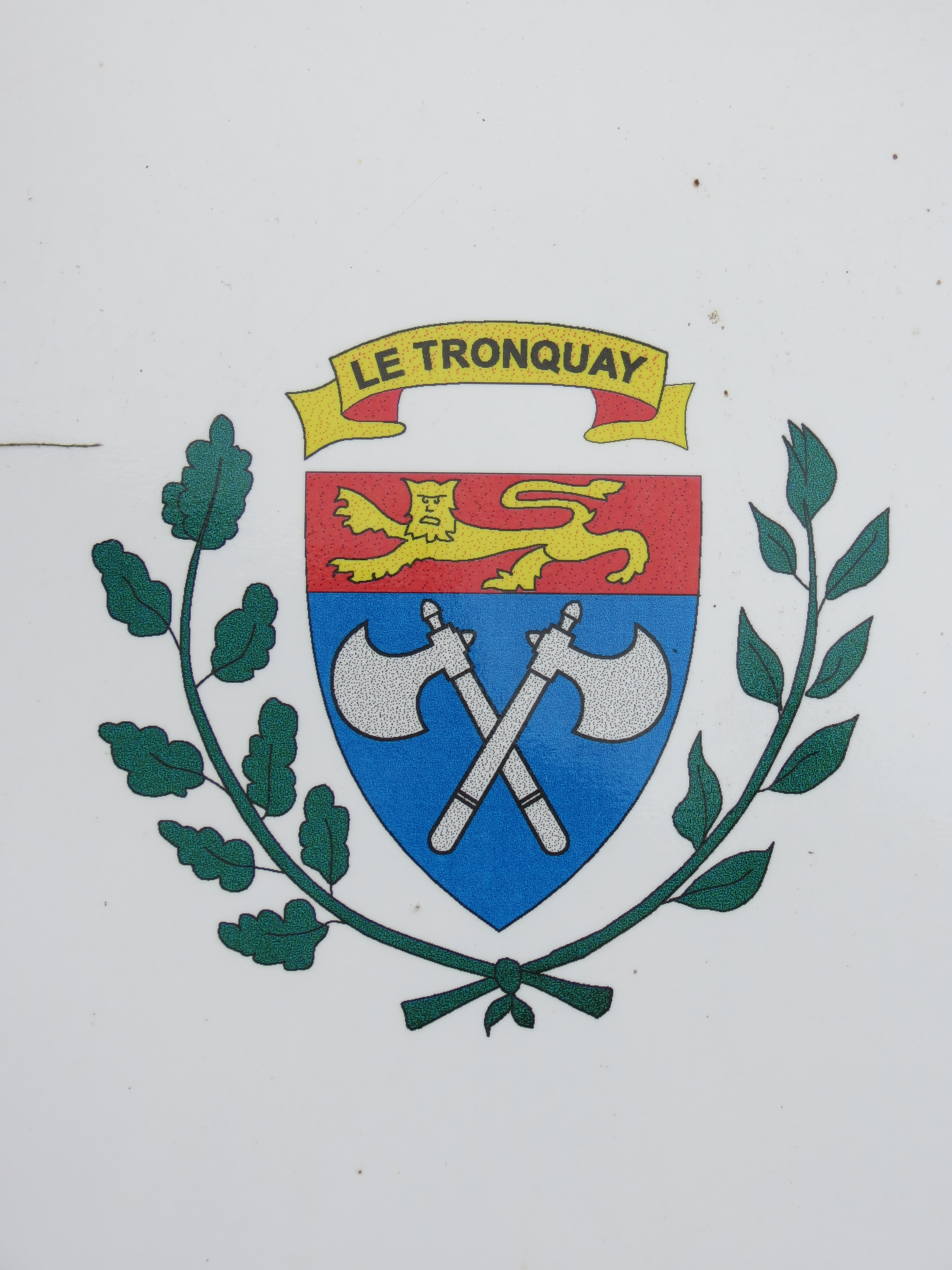 Blason du Tronquay